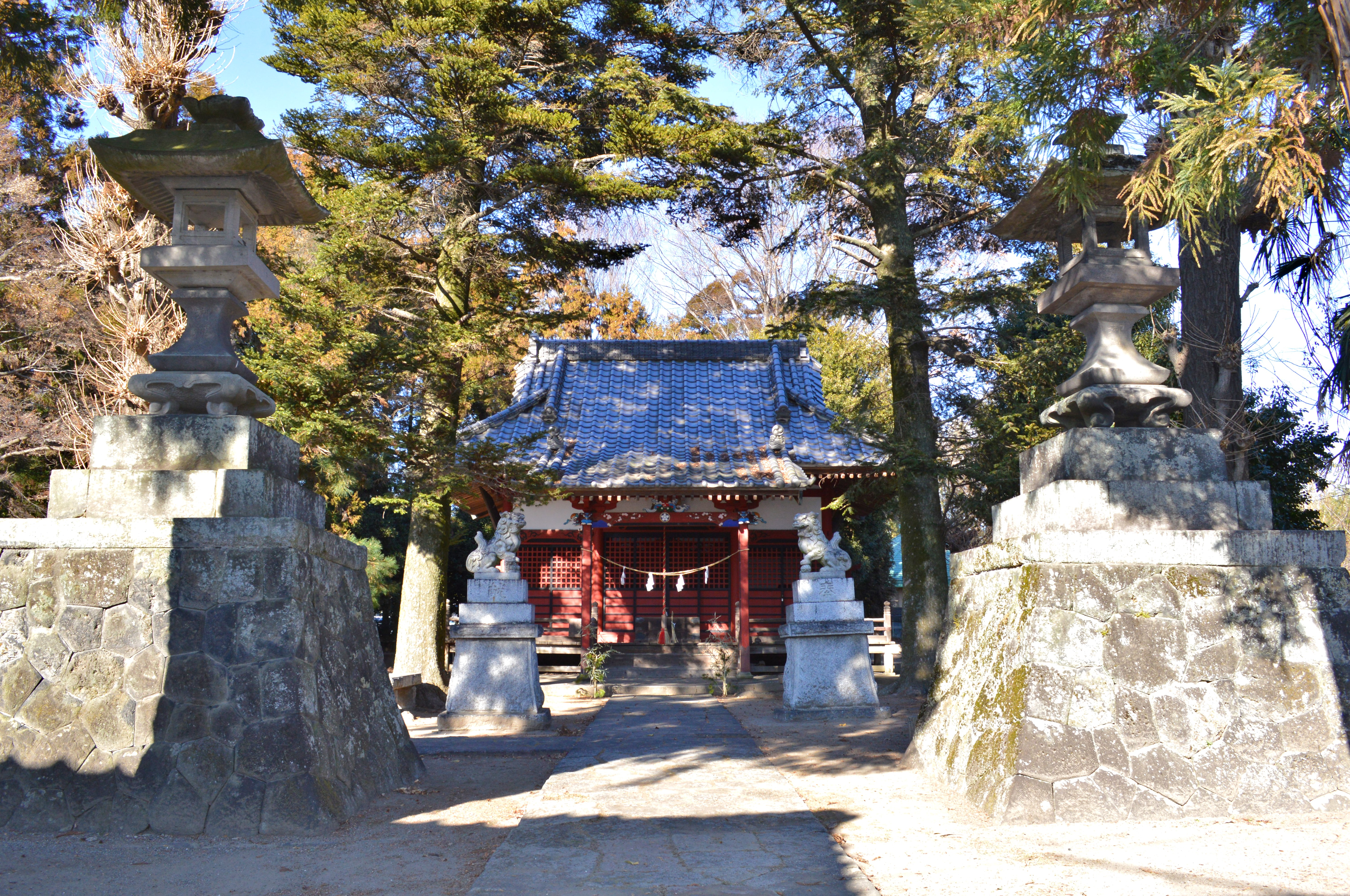 火雷神社 (玉村町) 拝殿